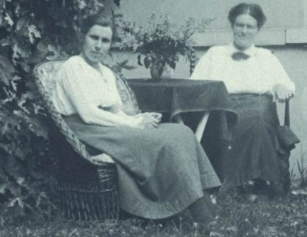 foto uit 1922 komen uit de nalatenschap van Johanna Westerdijk (rechts van Bea Schwarz op de onderste foto). Johanna Westerdijk werd in 1917 de eerste vrouwelijke hoogleraar van Nederland. Bea Schwarz was haar eerste promovenda.